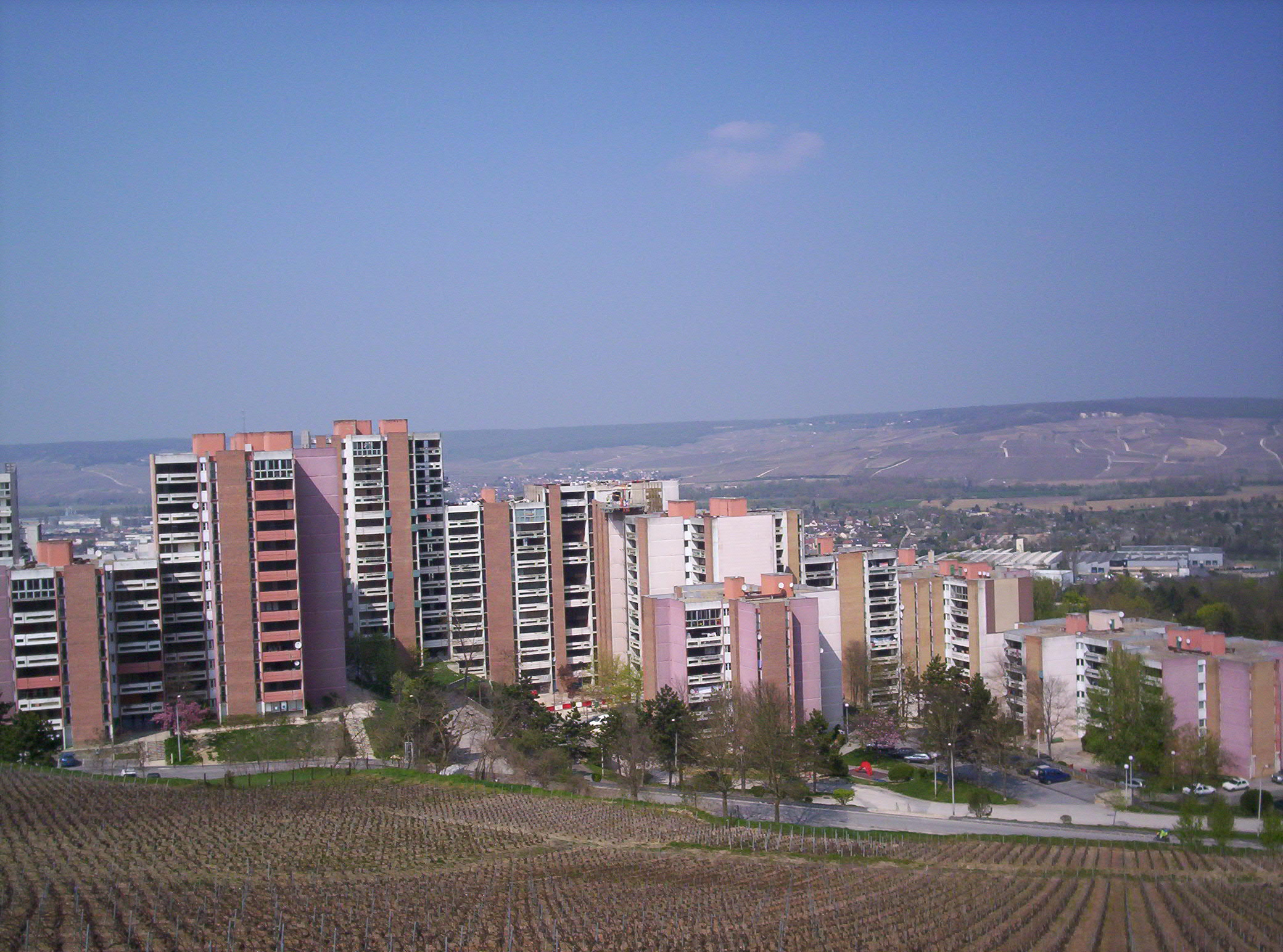 Quartier du Mont Bernon, vue depuis le mont homonyme